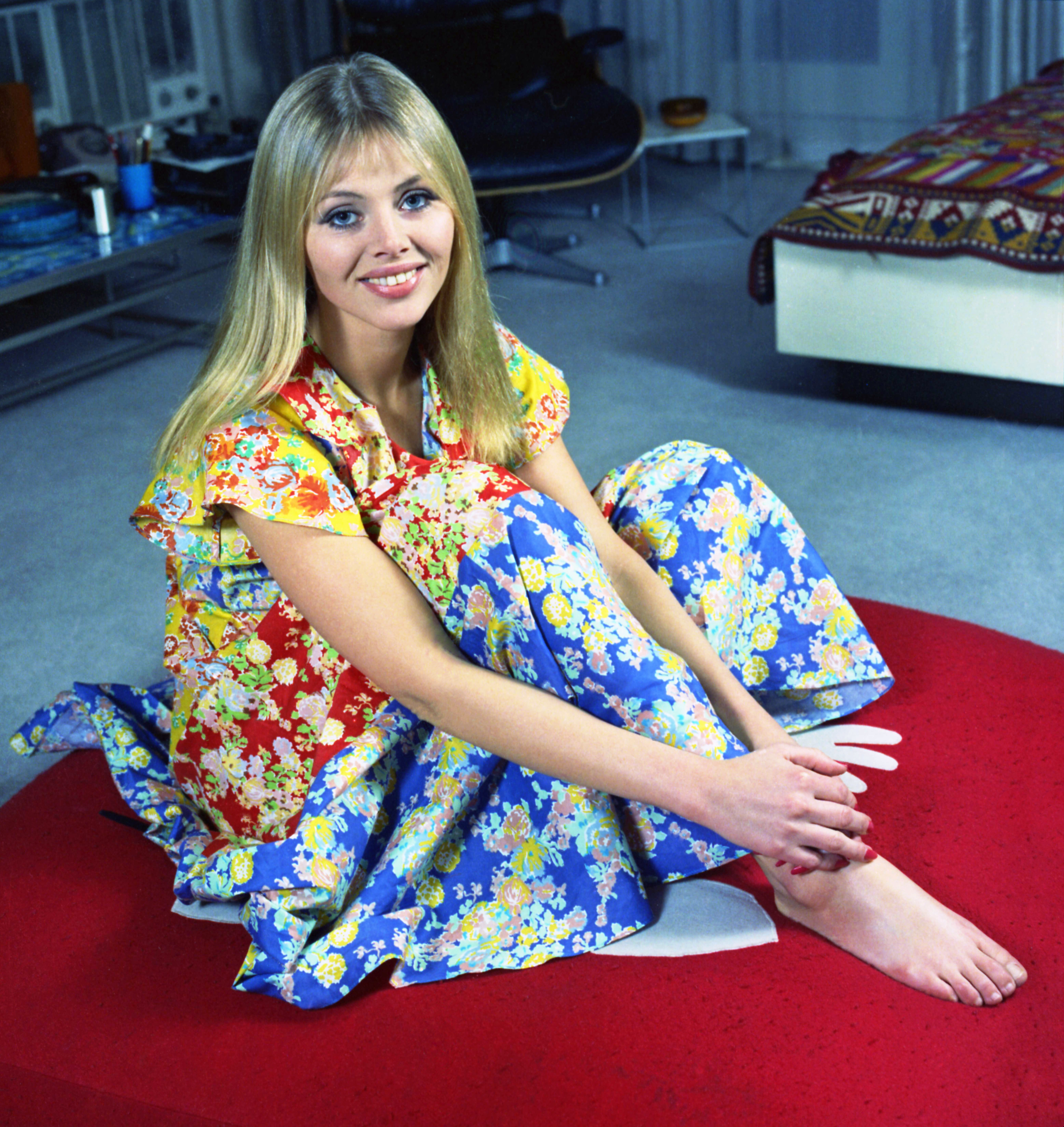 Britt Ekland ritratta scalza nel suo appartamento Half Moon Street Mayfair London